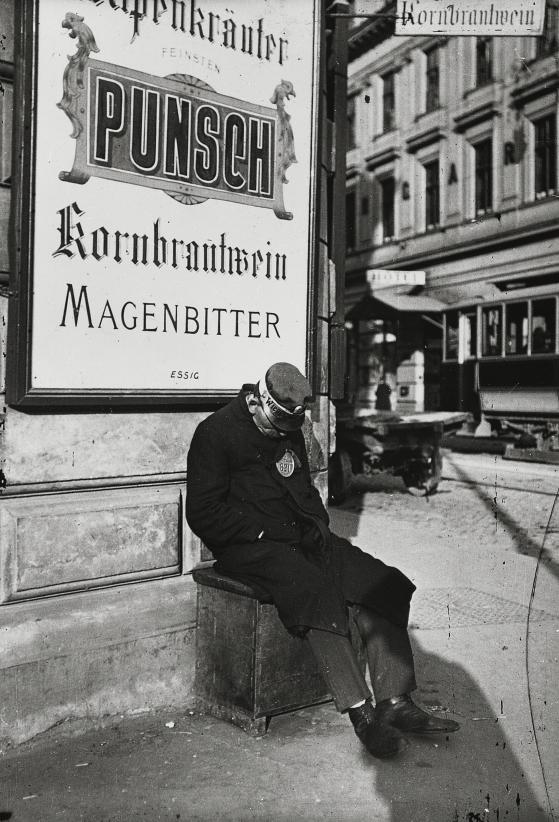 Müder Dienstmann am Radetzkyplatz; Photographie aus Wien